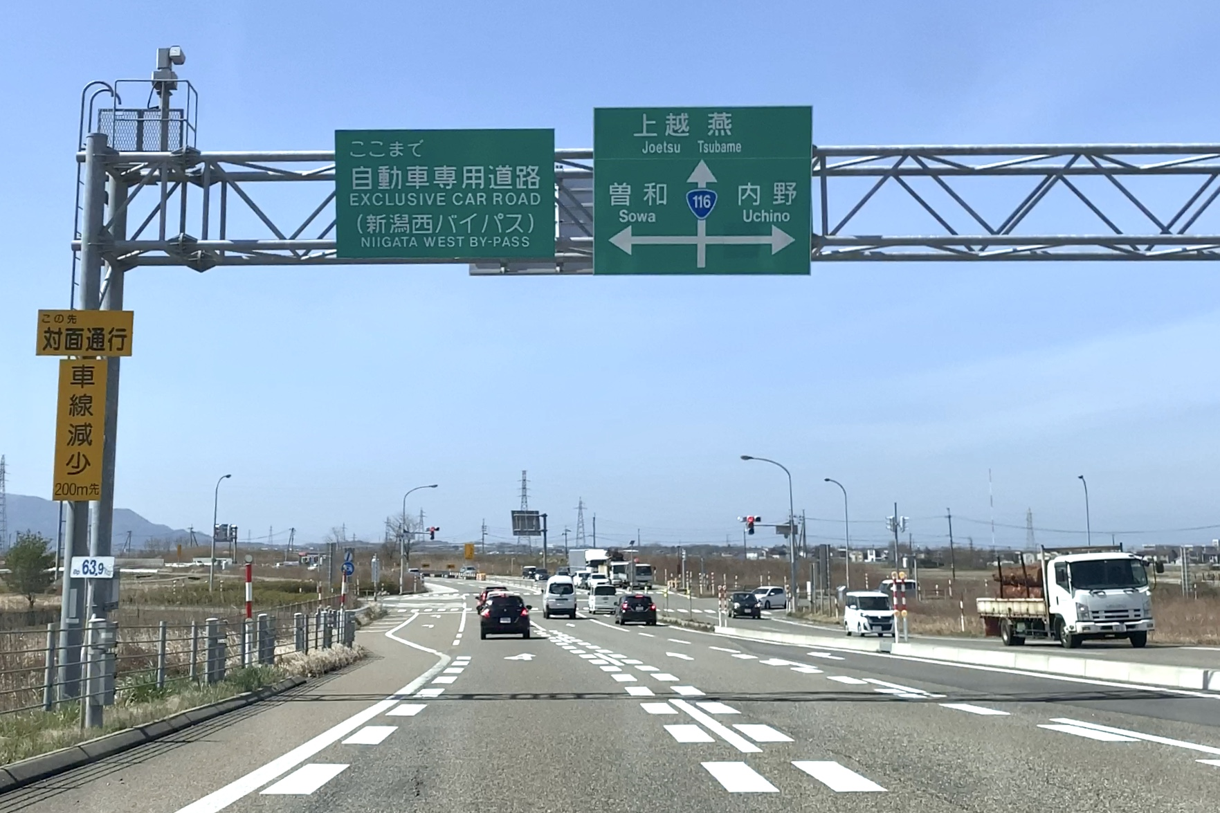 新潟西バイパス・曽和インターチェンジ（2020年3月）